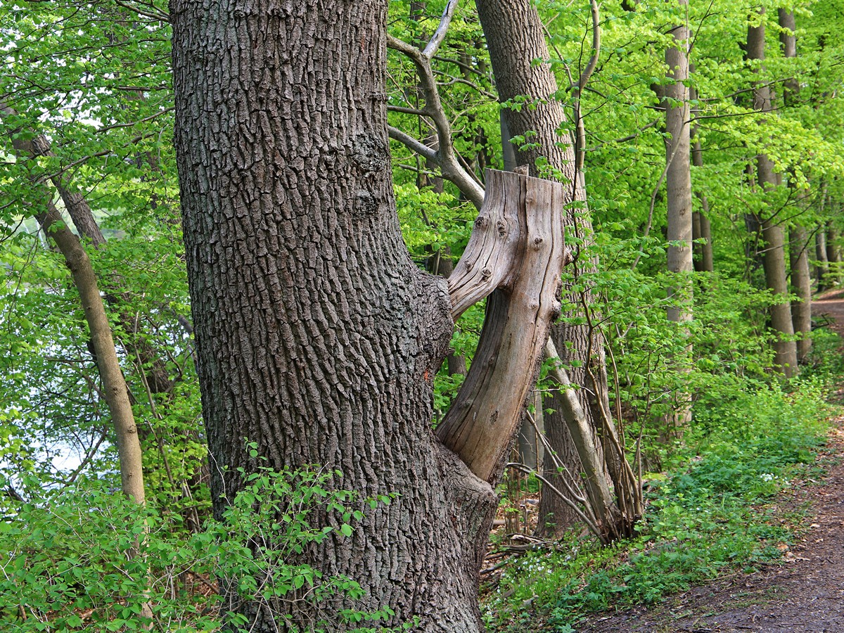 Baumauswuchs in einem früheren Hutewald am Schaalsee